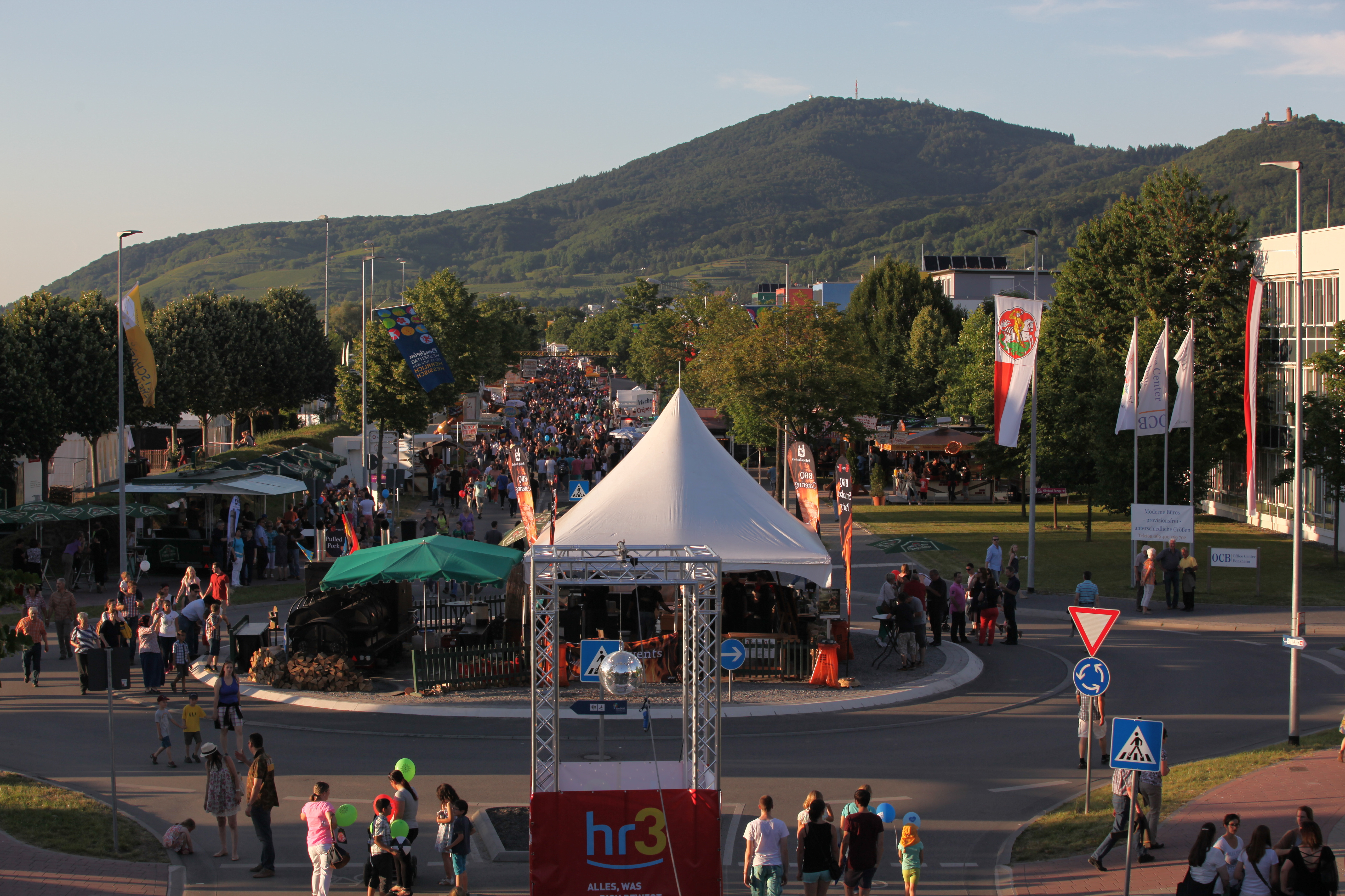 Die Festmeile beim Hessentag 2014 in Bensheim am 6. Juni 2014.